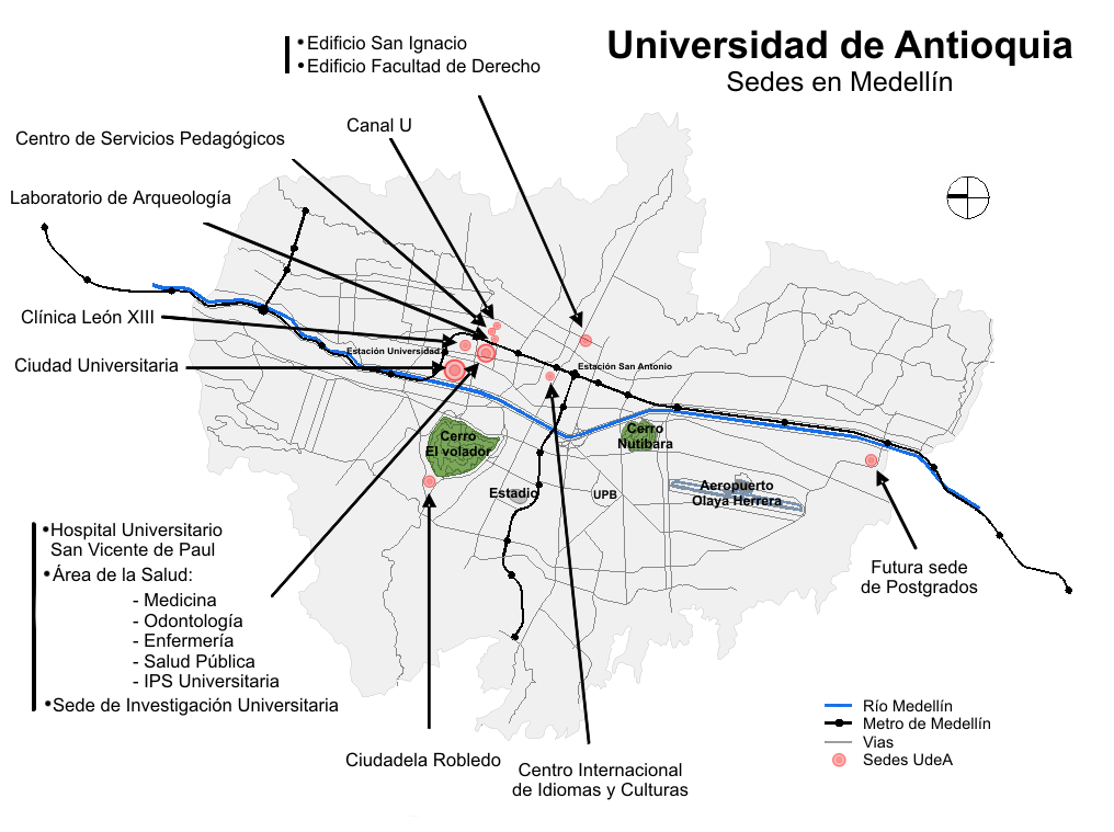 Mapa de las sedes de la Universidad de Antioquia en Medellín, Colombia